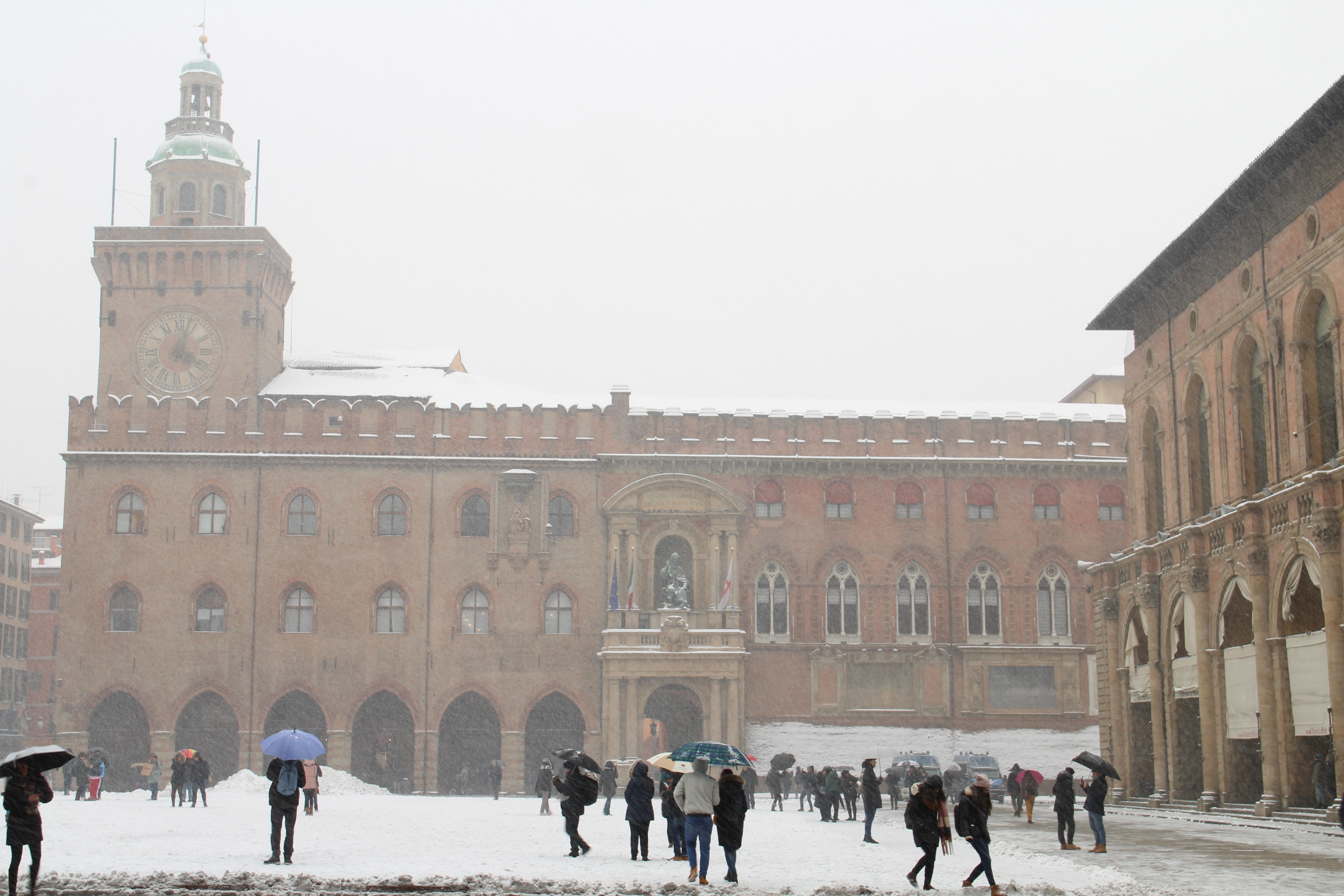 Bologna innevata nel marzo 2018